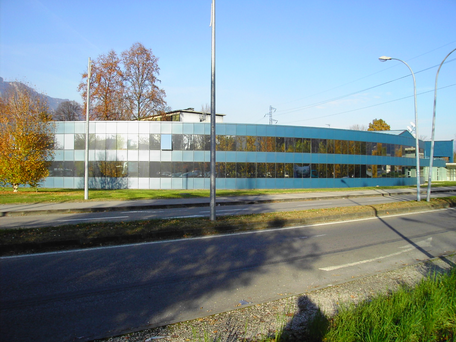 Centre National d'Etude à Distance - Campus Grenoble